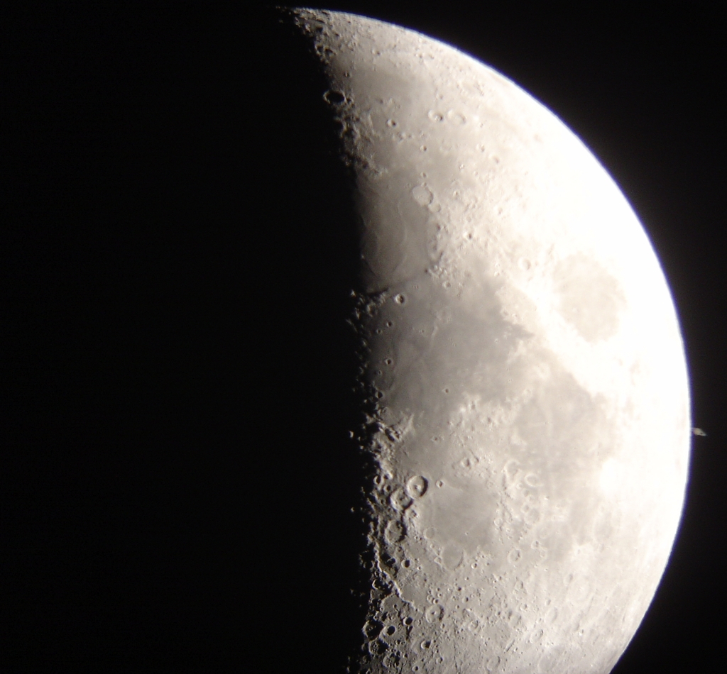 Transit de la Lune devant Saturne / Moon transit in front of Saturn